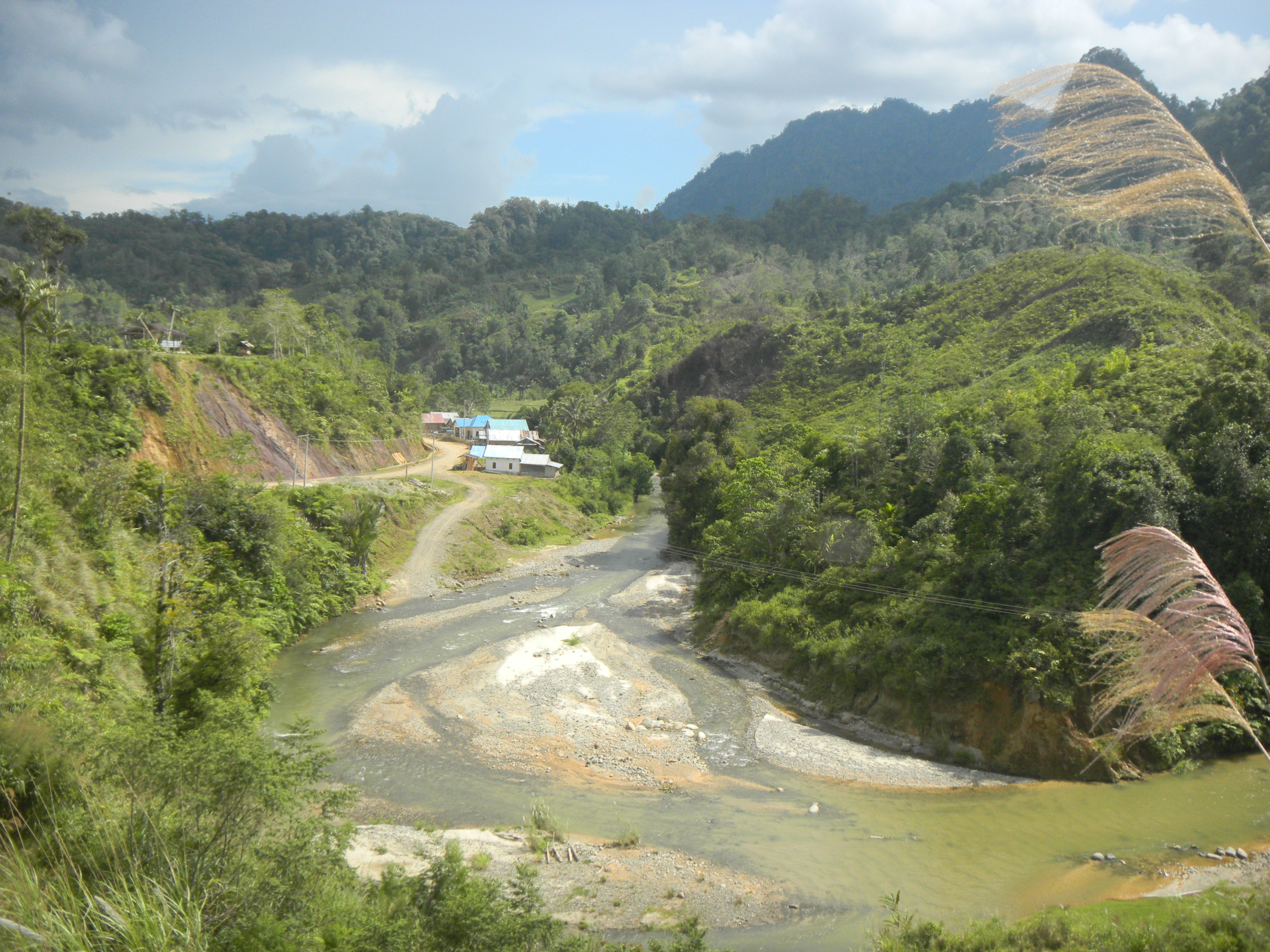 Burana, Tabulahan, Mamasa Regency, West Sulawesi, Indonesia